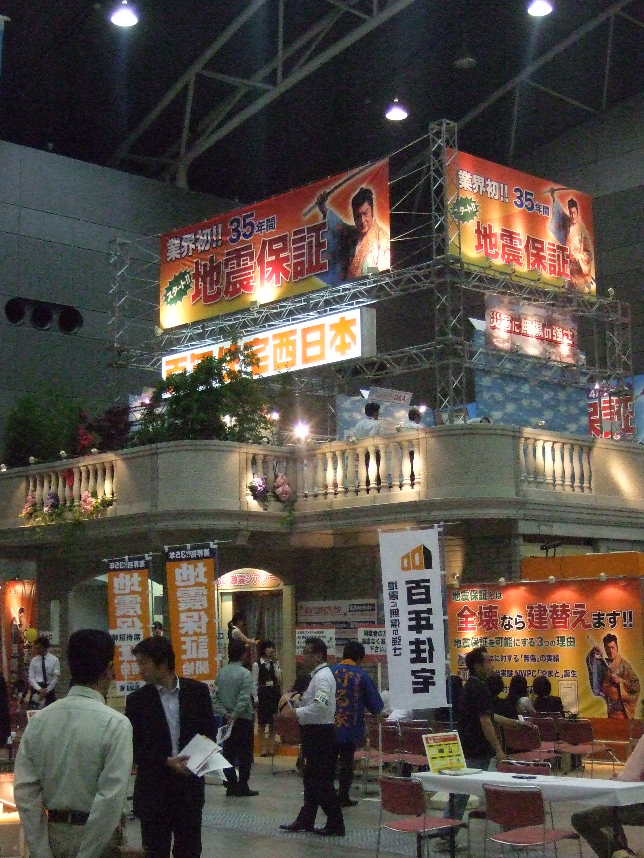 百年住宅のイベント。イベント会場にPCパネルを持ち込み、3Dシアターで安全性をアピールしている。